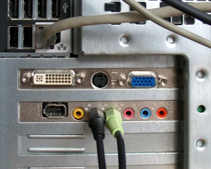 Multimedia PC. Tilslutninger på bagsiden. Lydkort med 1394-stik, DVI/VGA-stik, tastatur, mus, VHS-udtag mv.